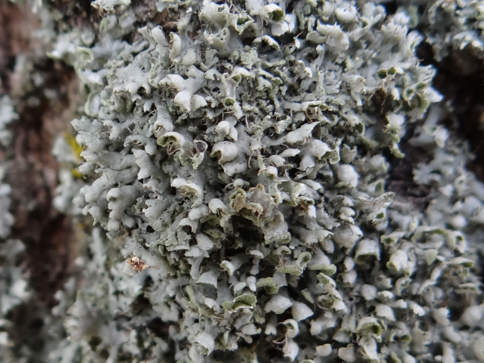 Physcia adscendens (location: Poland)